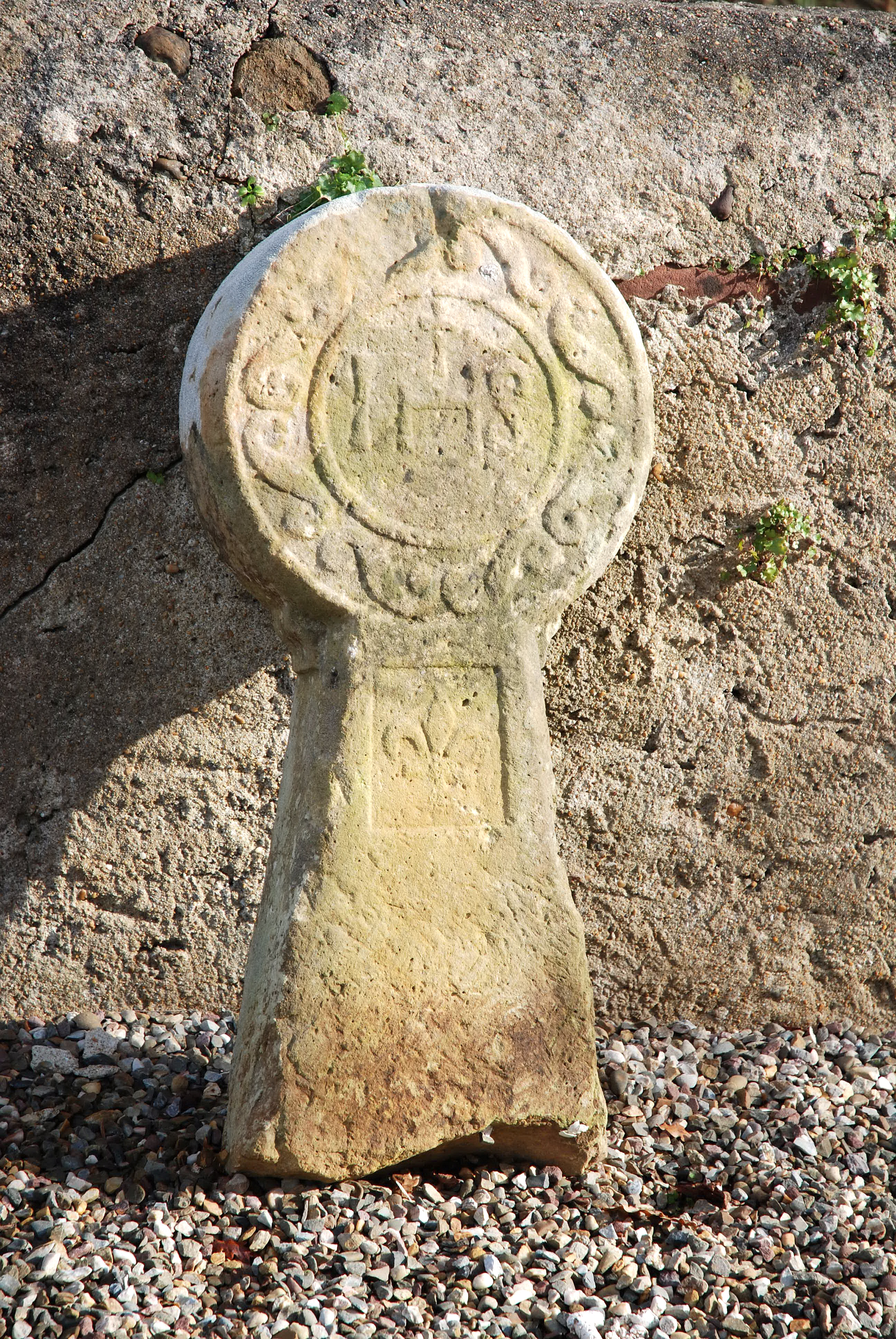 Halsou, stèle discoïdale. photo prise le 31/12/06 par Harrieta171